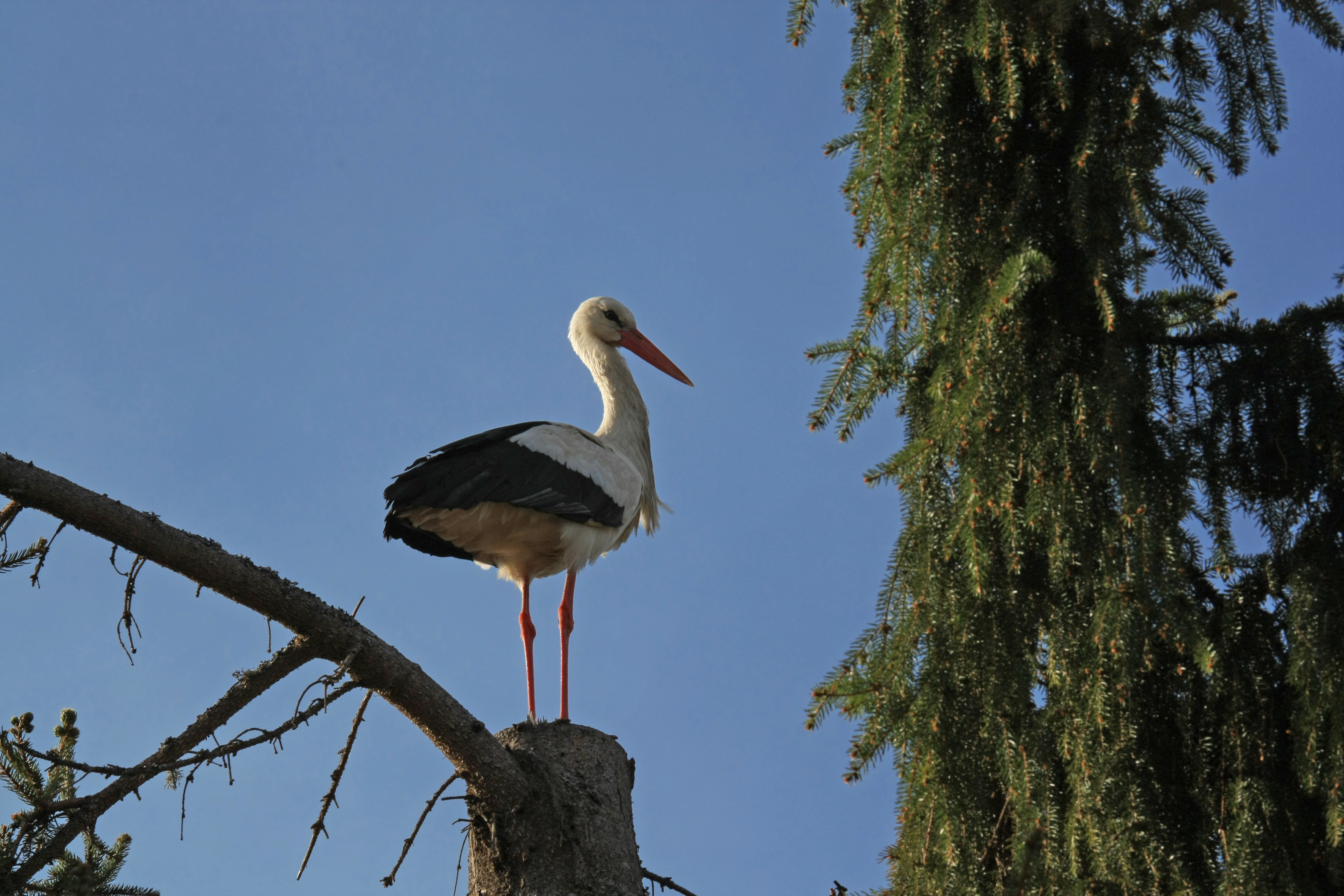 Valge toonekurg